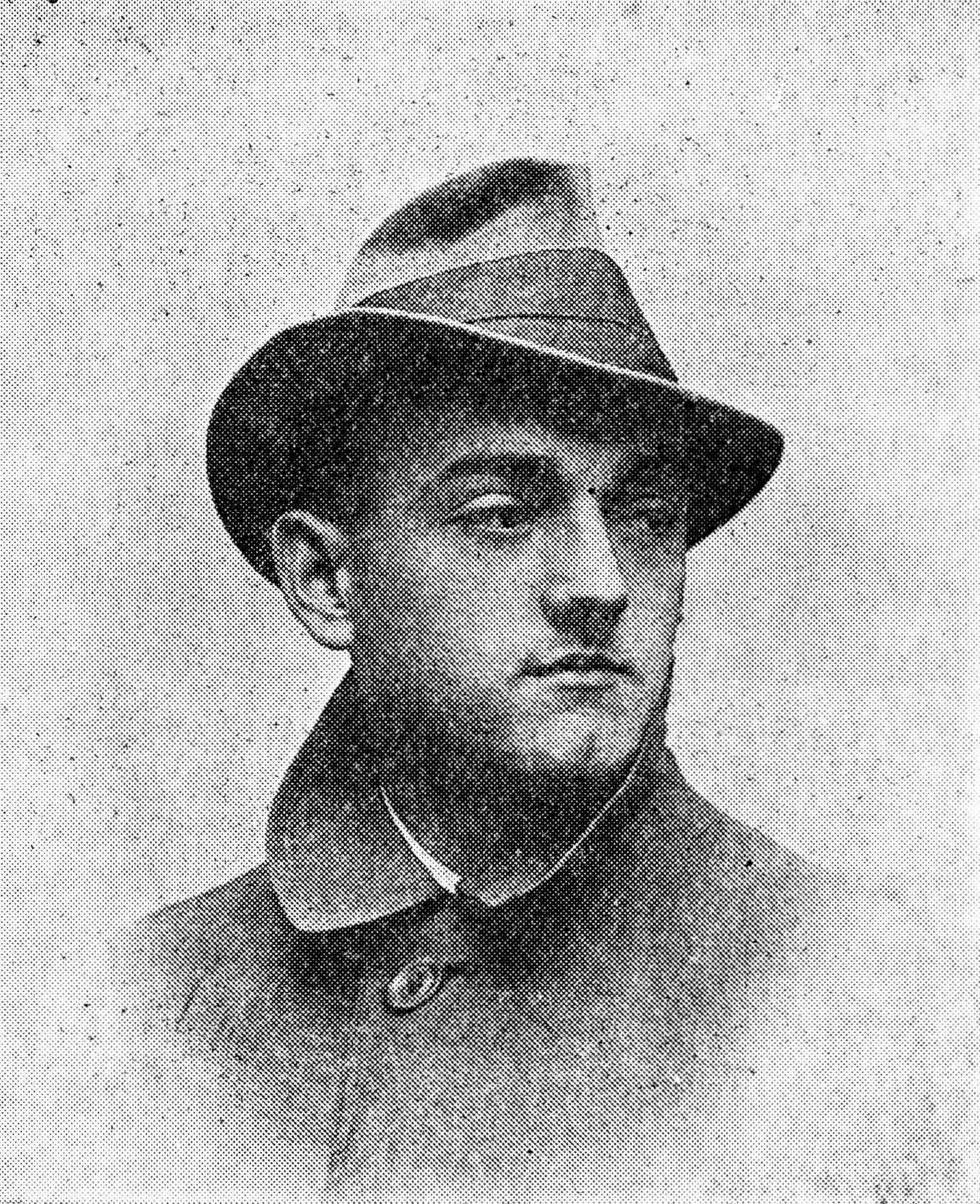 Ludwik Sempolińśki w okresie występów amatorskich w "Promenadzie", 1917